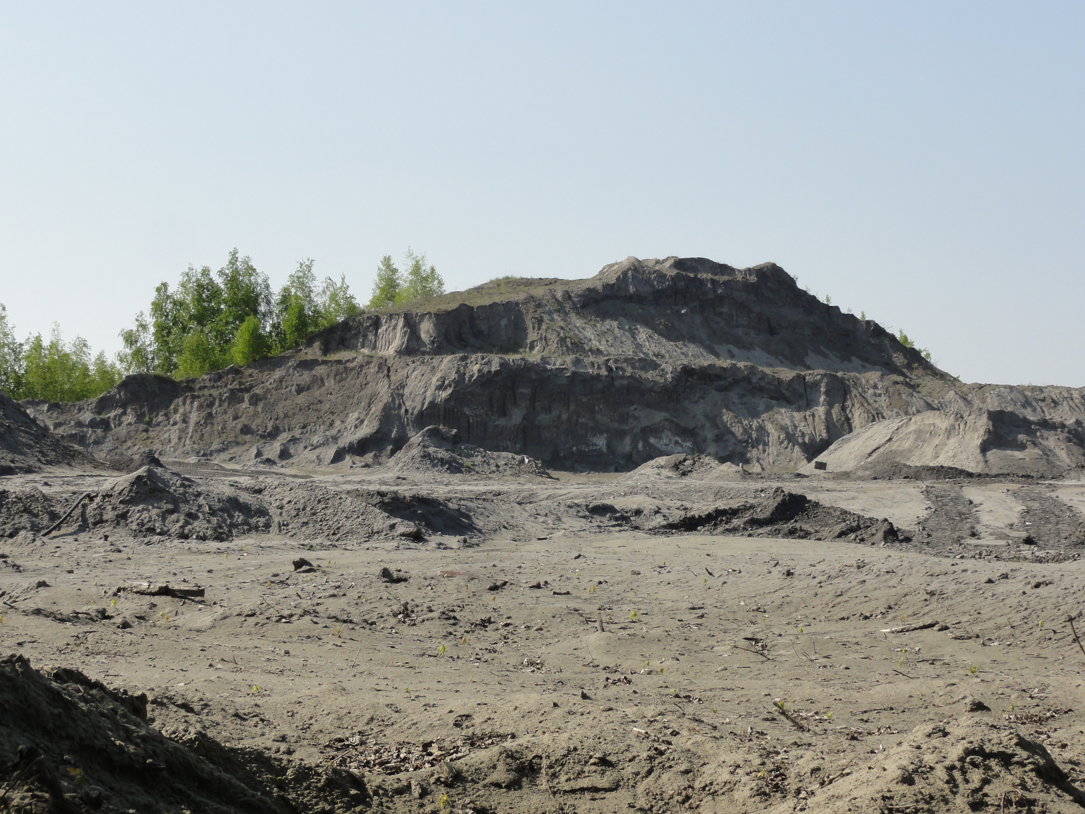 Terril n° 151 dit Centrale d'Hornaing, Centrale thermique d'Hornaing du Groupe de Valenciennes, Hornaing, Nord, Nord-Pas-de-Calais, France.